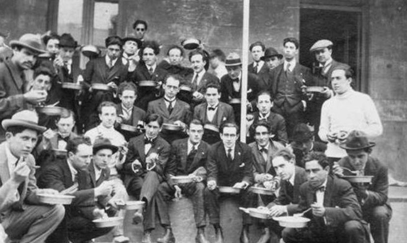 Estudiantes de la Federación Universitaria de Córdoba detenidos por el Ejército en el Regimiento 4 de Artillería de Córdoba, luego de ser detenidos en la toma de la Universidad de Córdoba del 9 de septiembre de ese año, en el marco de la Reforma Universitaria de 1918. En total fueron detenidos 83 estudiantes.